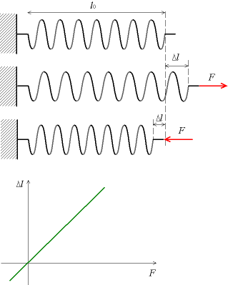 Modèle de déformation élastique de la matière. Auteur : Christophe Dang Ngoc Chan, réalisé avec un programme de dessin vectoriel. Licence GFDL Christophe Dang Ngoc Chan